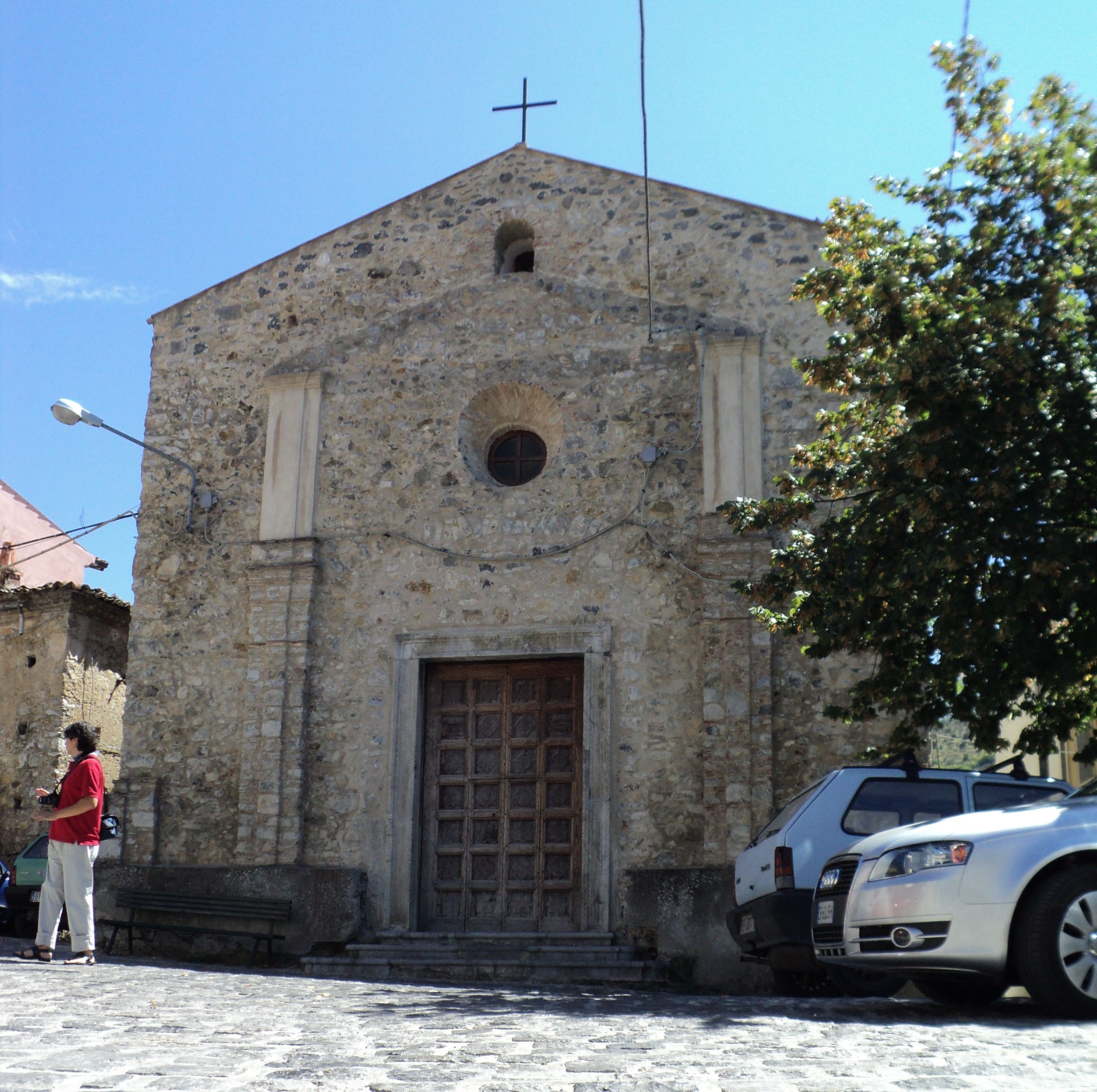 Cappella dell'Assunta